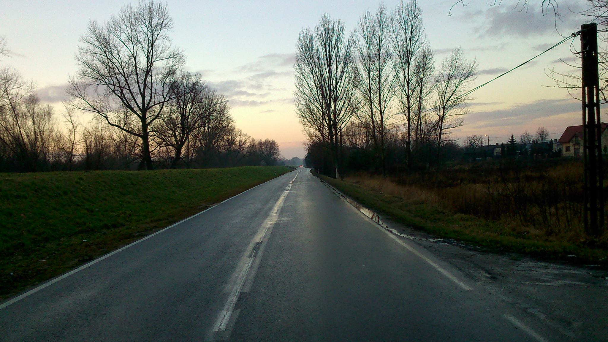 Zdjęcie drogi wojewódzkiej przebiegającej przez wieś Kosumce.